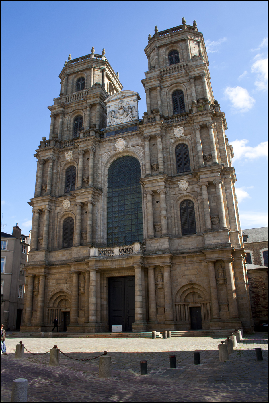 Parvis de la cathédrale Saint Pierre à Rennes .